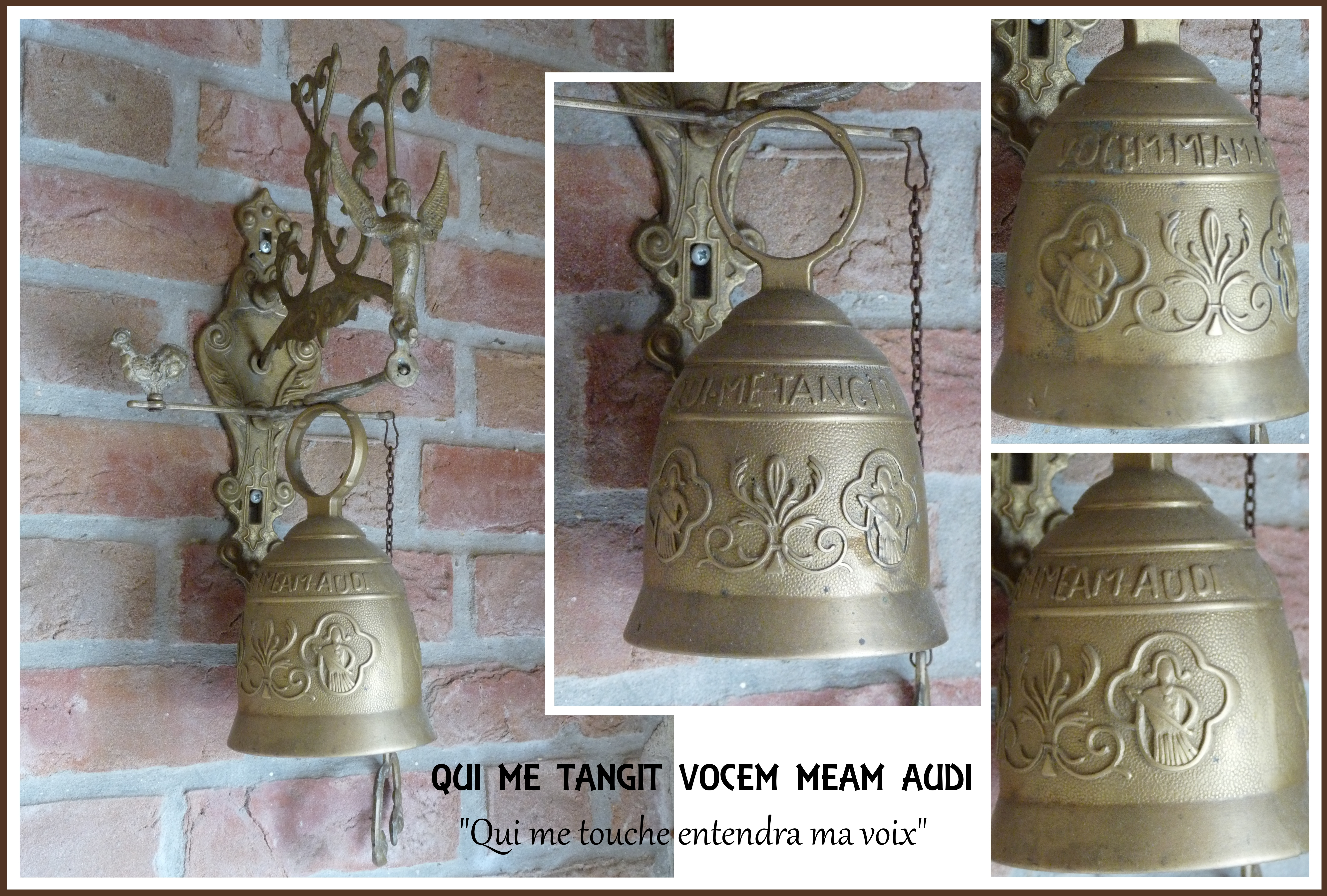 Bell door